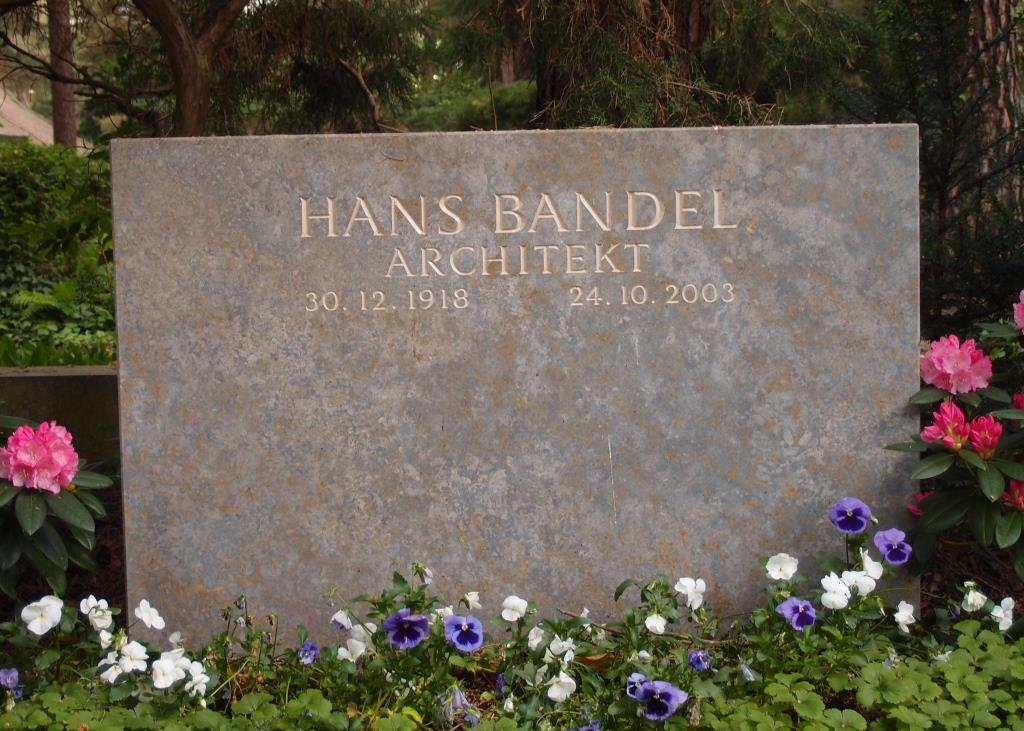 Grab des Architekten Hans Bandel (1918-2003) auf dem Waldfriedhof Dahlem in Berlin